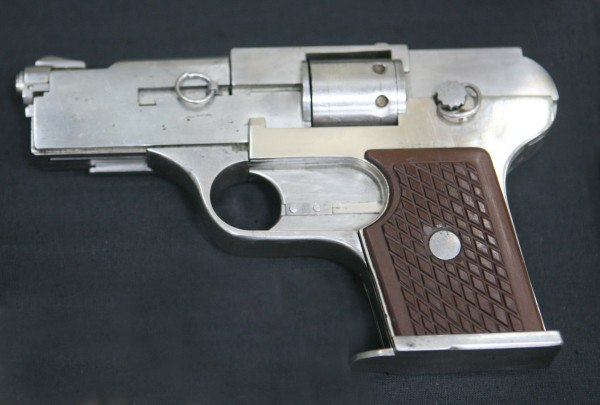 Самодельный револьвер банды "Фантомасы".